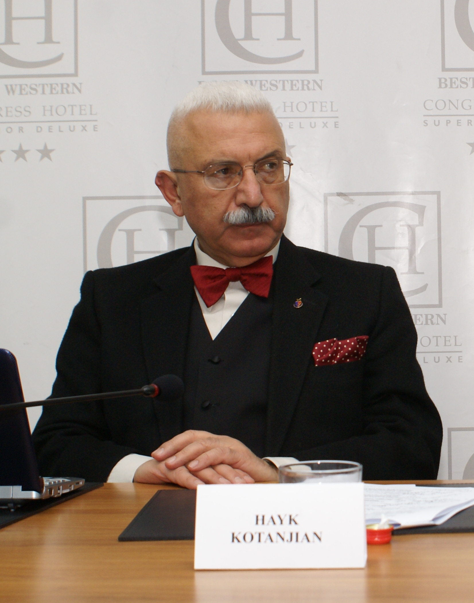 Доктор, профессор Гайк Котанджян